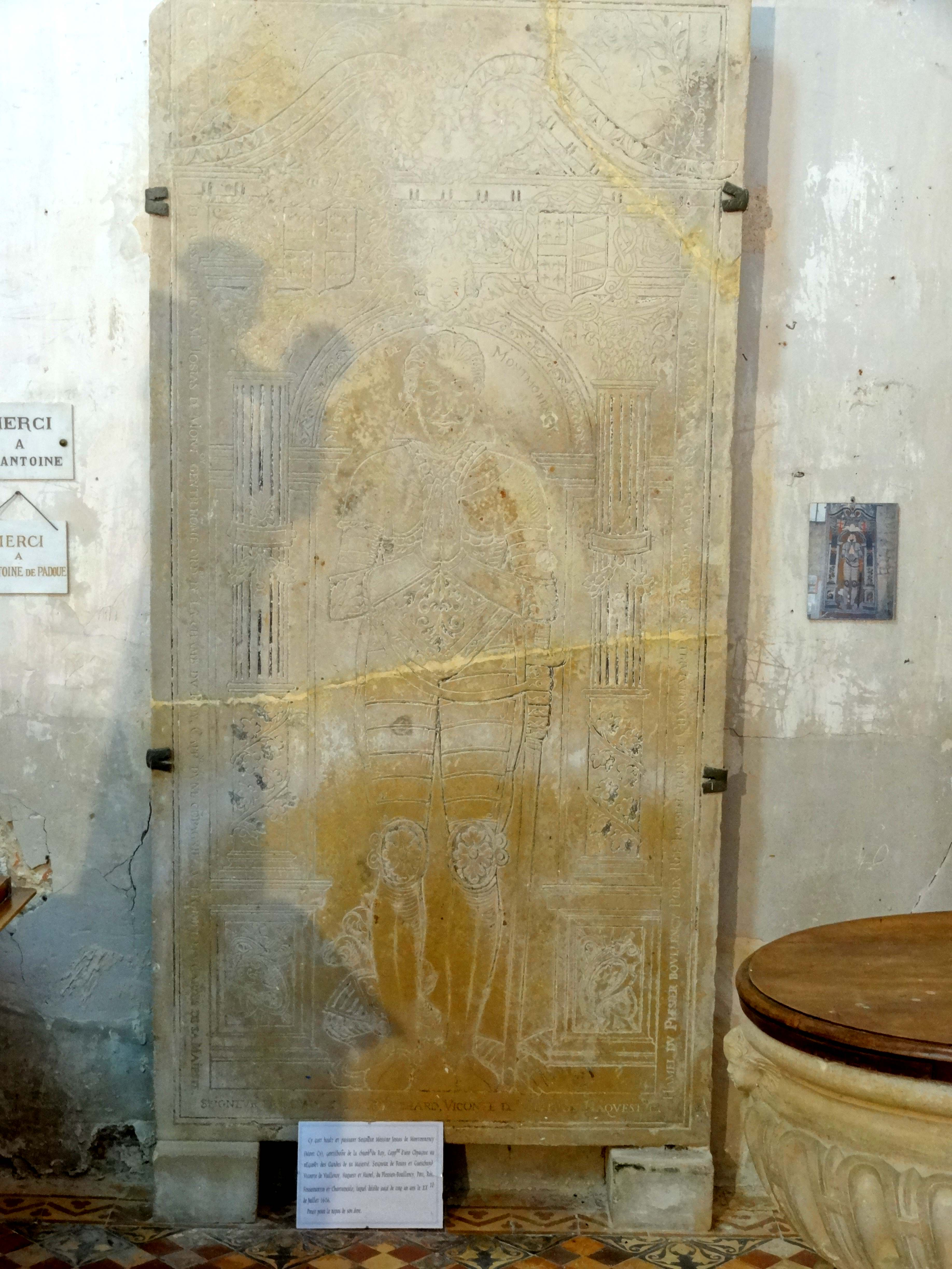 Mobilier de l'église - voir titre.